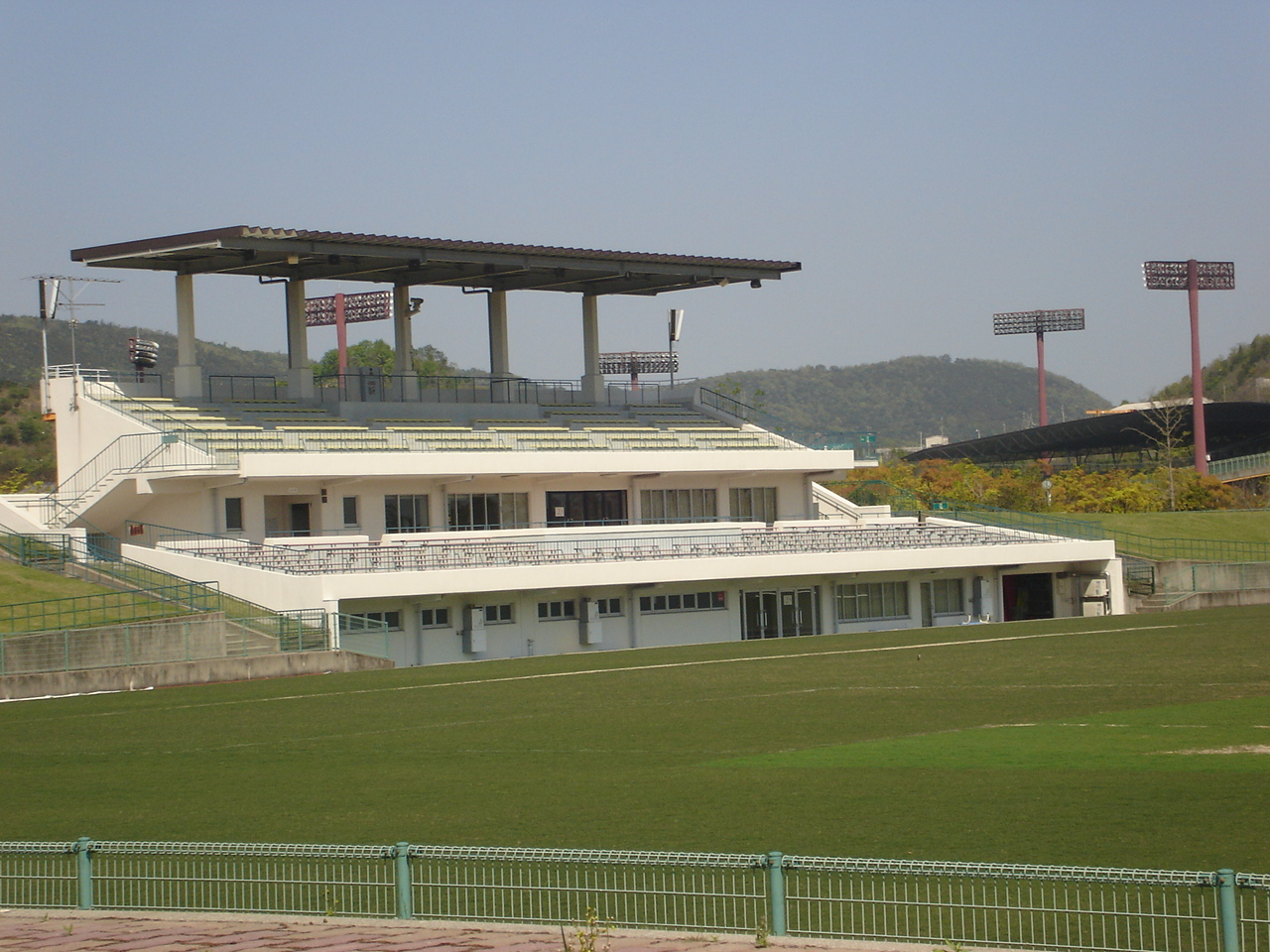 香川県営サッカー・ラグビー場。 - 日本国香川県高松市にある競技場。